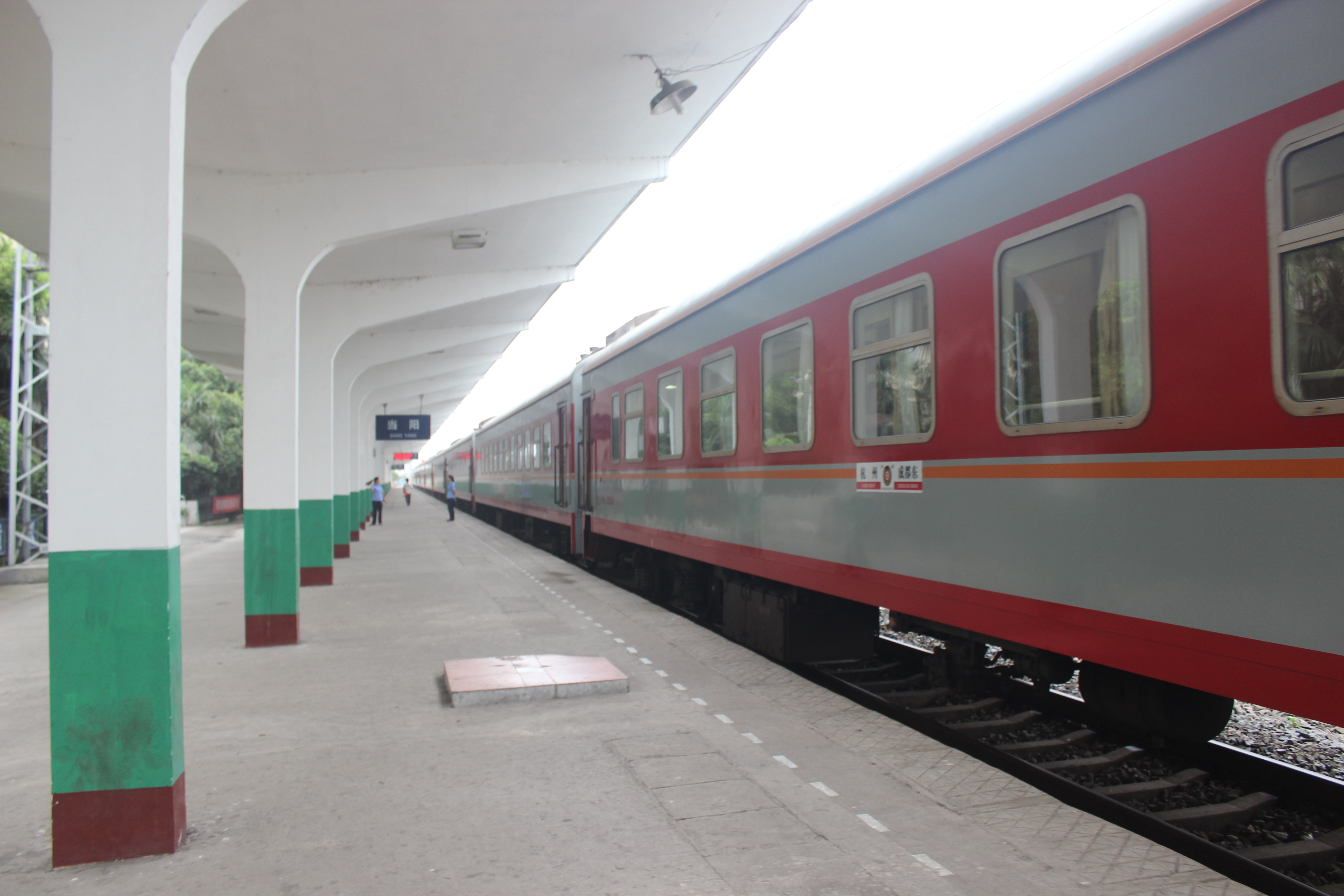 中文（中国大陆）: 当阳火车站 湖北省铁路系统 三等站